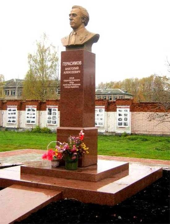 Бюст Герасимов Анатолий Алексеевич. Рыбинск. Микрорайон Волжский